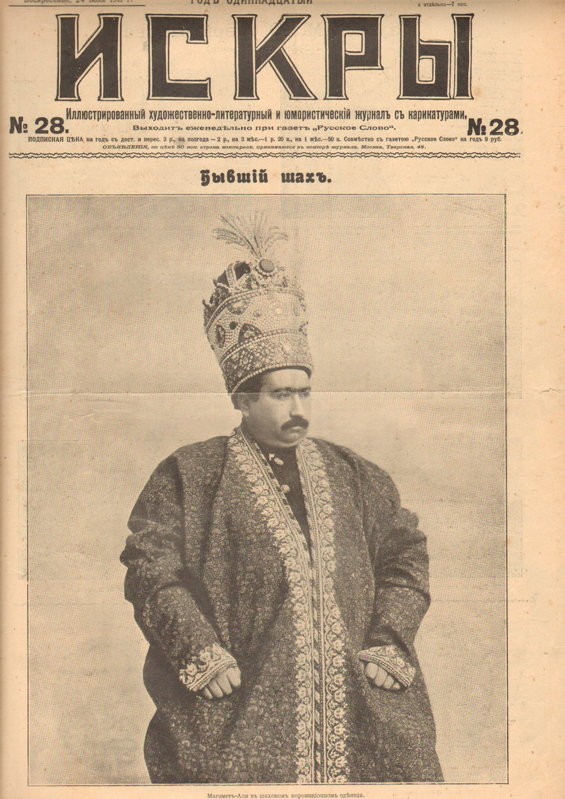 Иллюстрированный художественно-литературный и юмористический журнал с карикатурами «Искры».